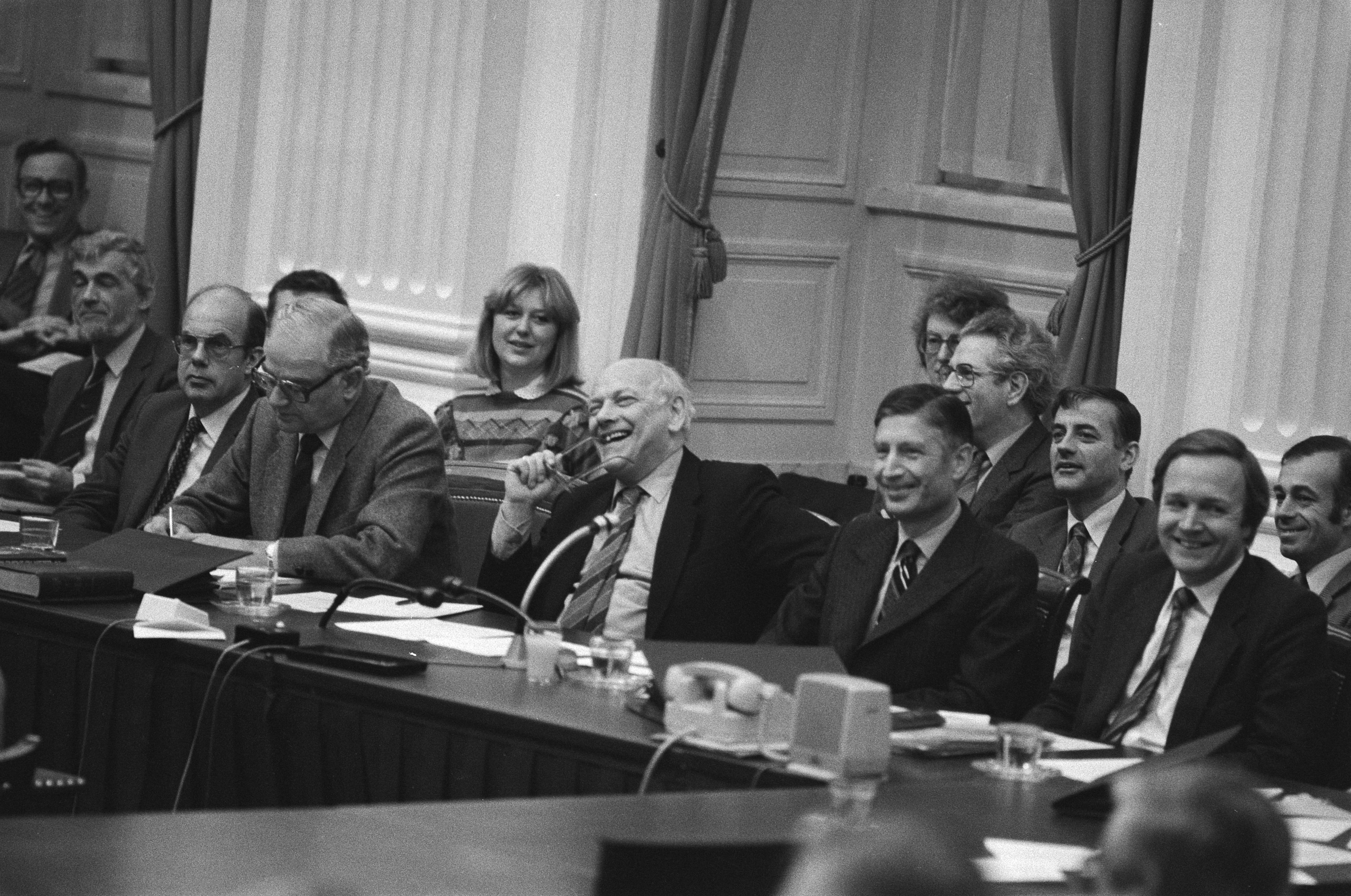 Tweede Kamer. Debat over de Regeringsverklaring Van links naar rechts, op de voorgrond de ministers De Ruiter (CDA), Van der Stee (CDA), Den Uyl (PvdA), premier Van Agt (CDA) en minister Terlouw (D66); op de achtergrond de staatssecretarissen Van de Doef (PvdA), Stuiveling (PvdA), Van Leijenhorst (CDA), Dik (D66) en Scheltema (PvdA) achter de regeringstafel.